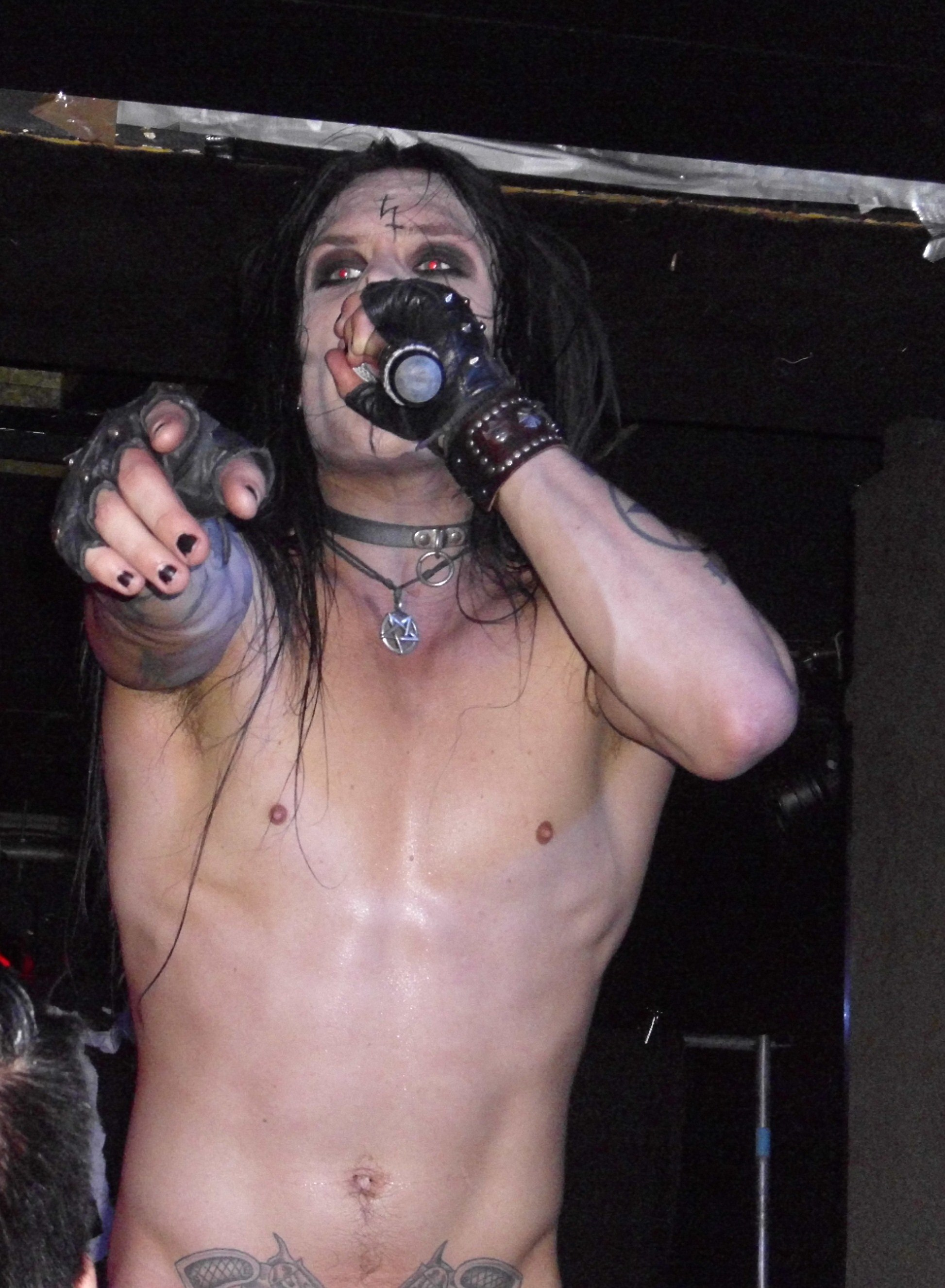 Sister-Konzertfoto